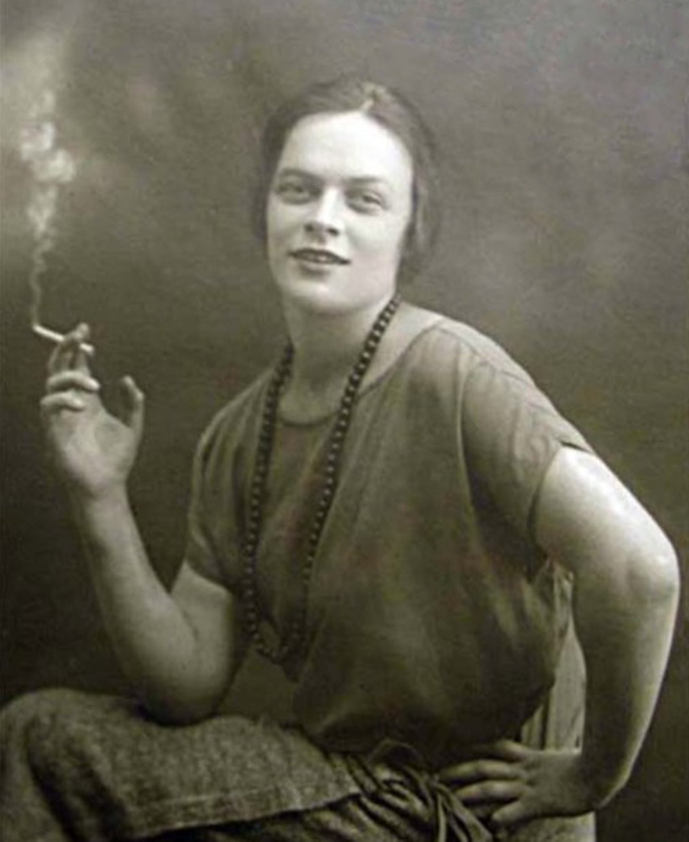 Татьяна Ивановна Пе́льтцер (24 мая (6 июня) 1904 — 16 июля 1992) — советская российская актриса театра и кино, Народная артистка СССР (1972). Лауреат Сталинской премии третьей степени (1951).